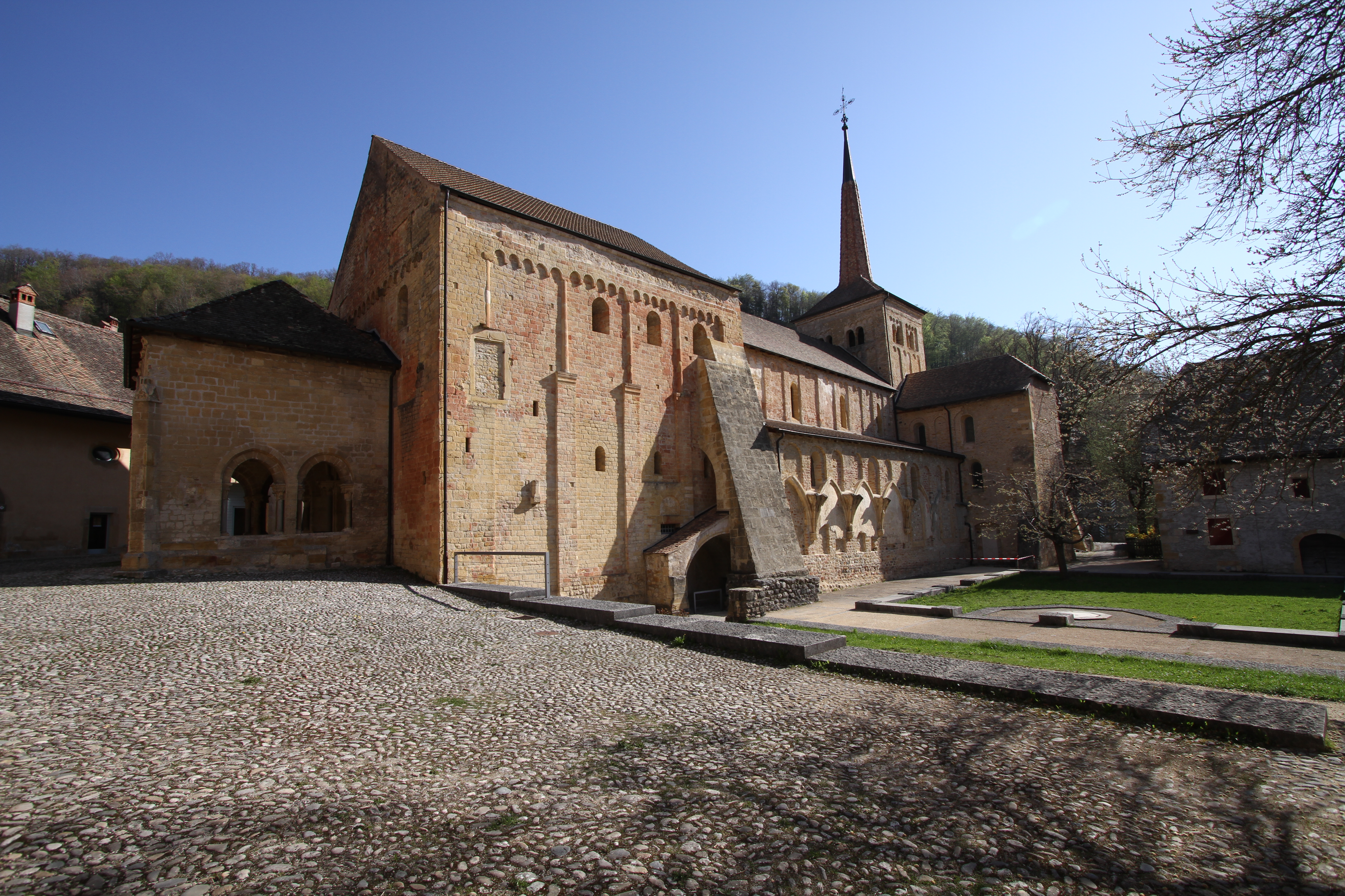 abbatiale de Romainmôtier